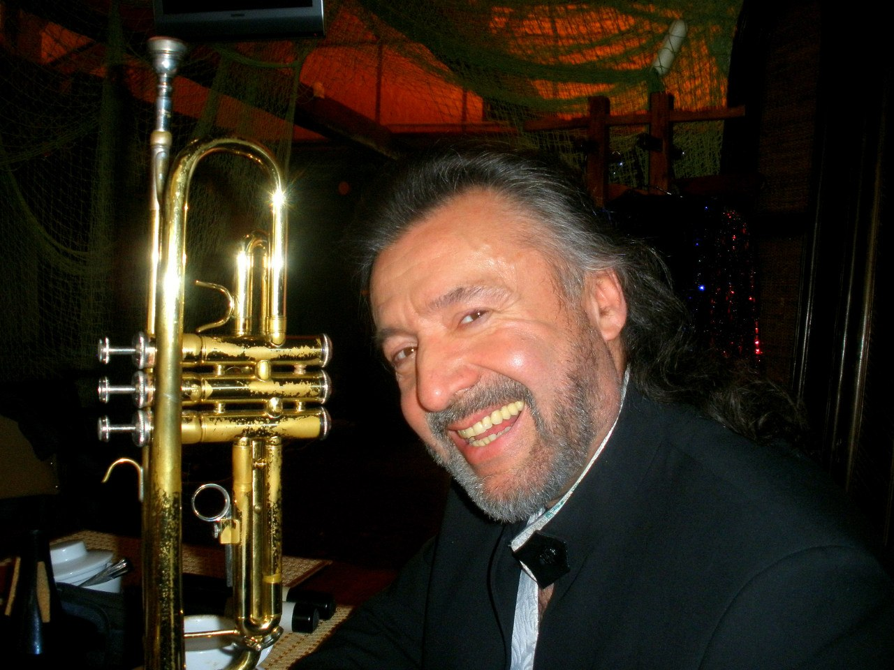 Рафик Кашапов, 2012